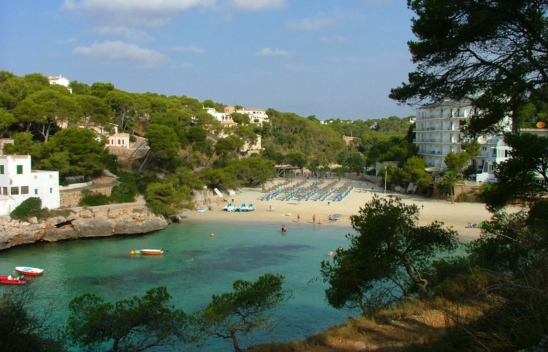 Cala Santanyí, Mallorca, Spain